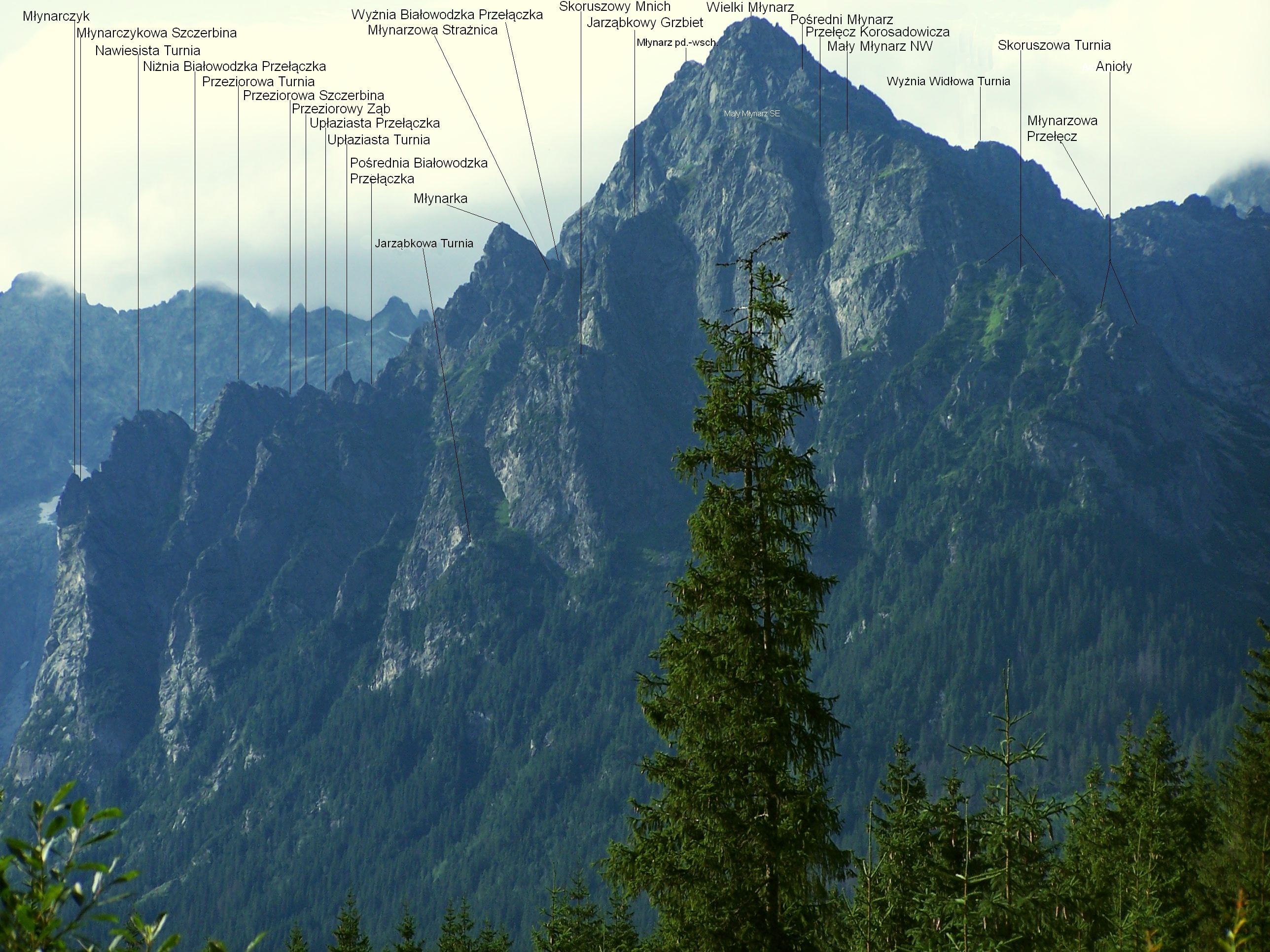 Młynarz. Widok z drogi do Morskiego Oka